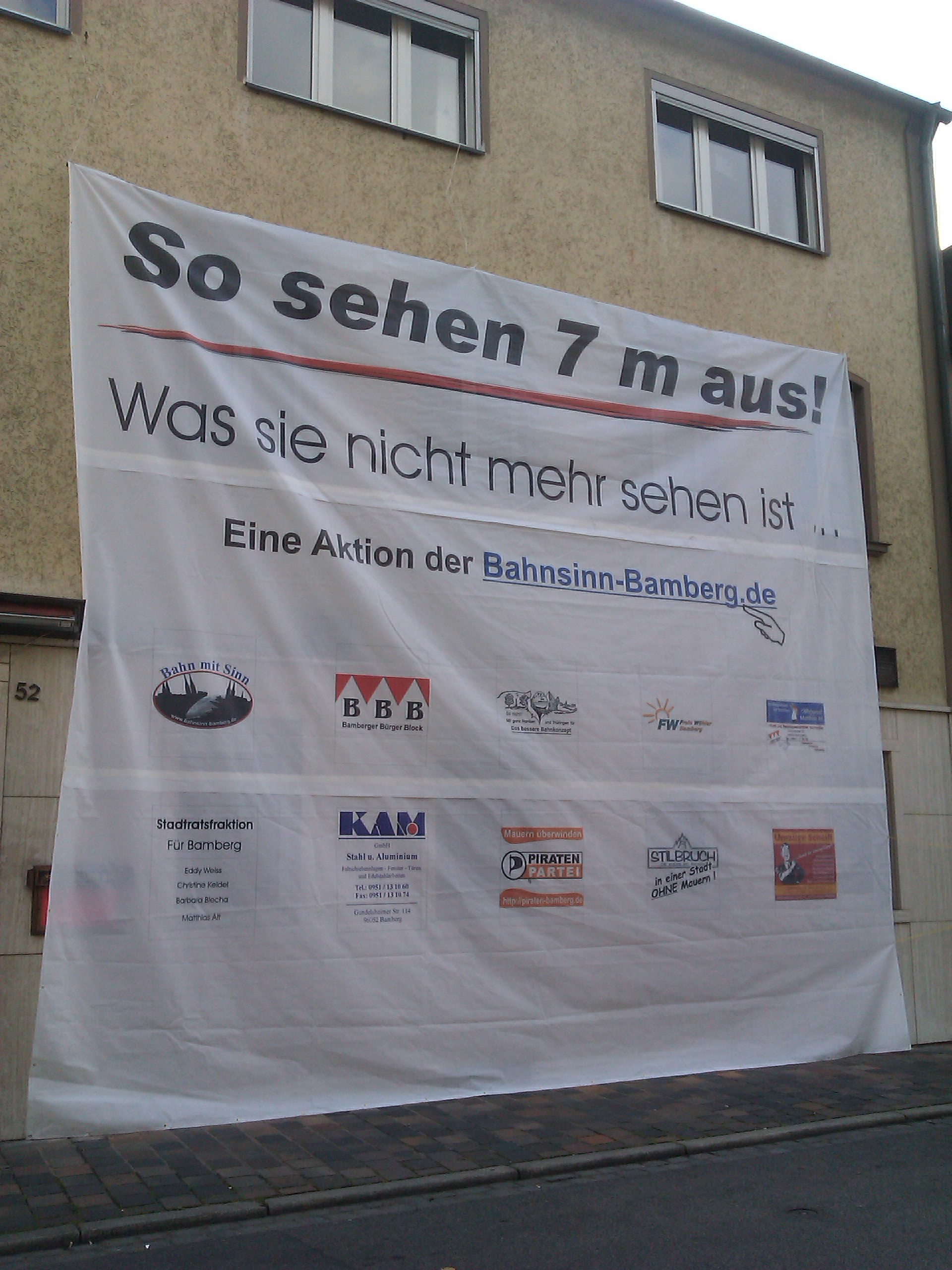 Protestbanner in der Erlichstraße in Bamberg gegen die von der Deutschen Bahn geplanten Lärmschutzwände.